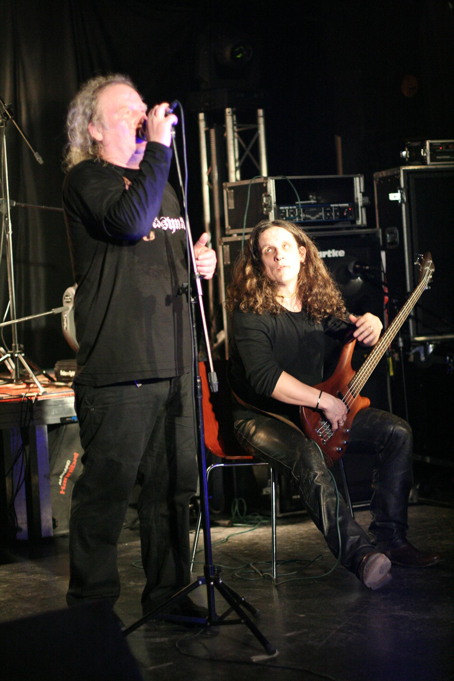 Zdęcie zrobione podczas koncertu 26.03.2010 w szczecińskim klubie Słowianin